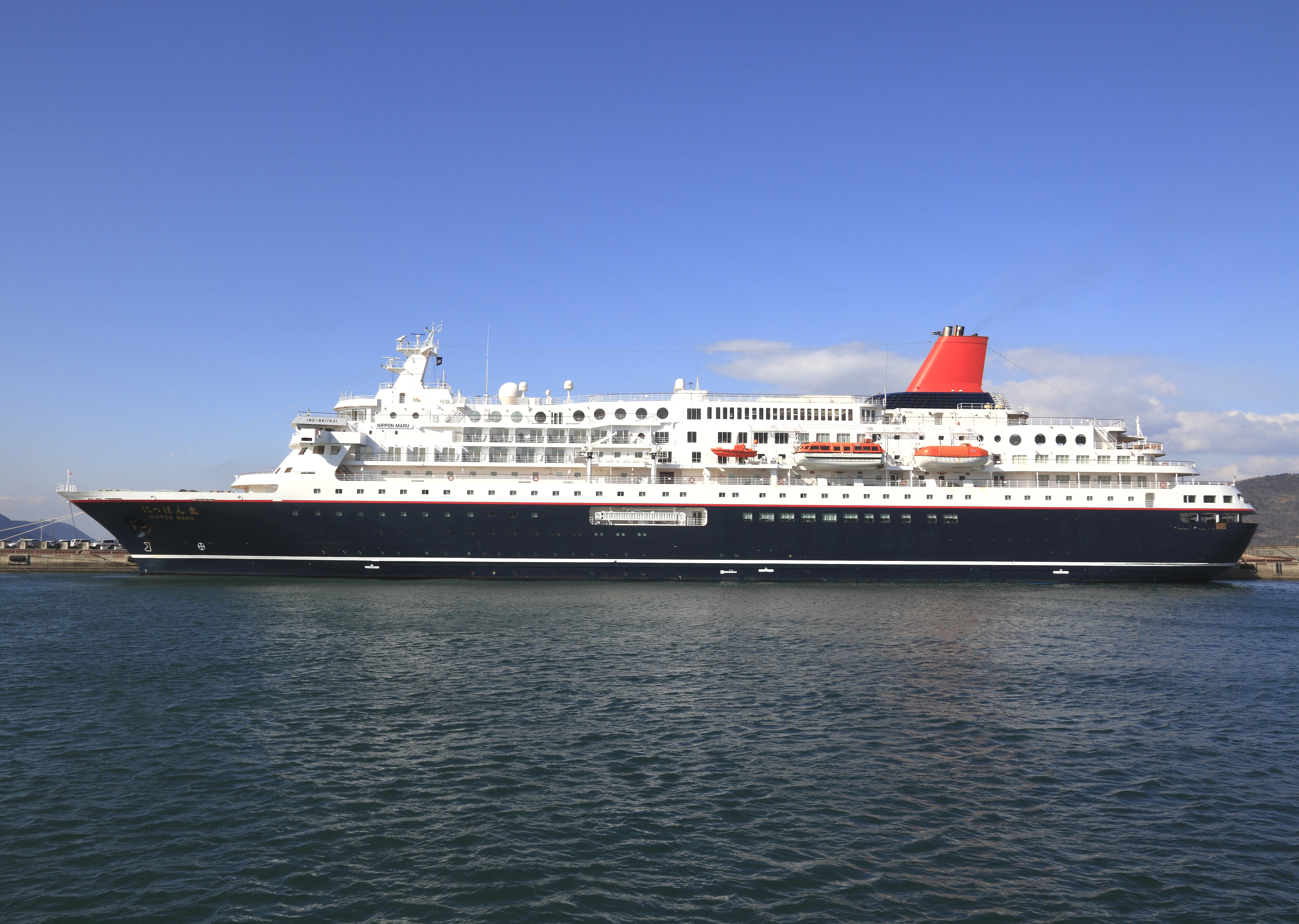 商船三井客船 にっぽん丸 高松港